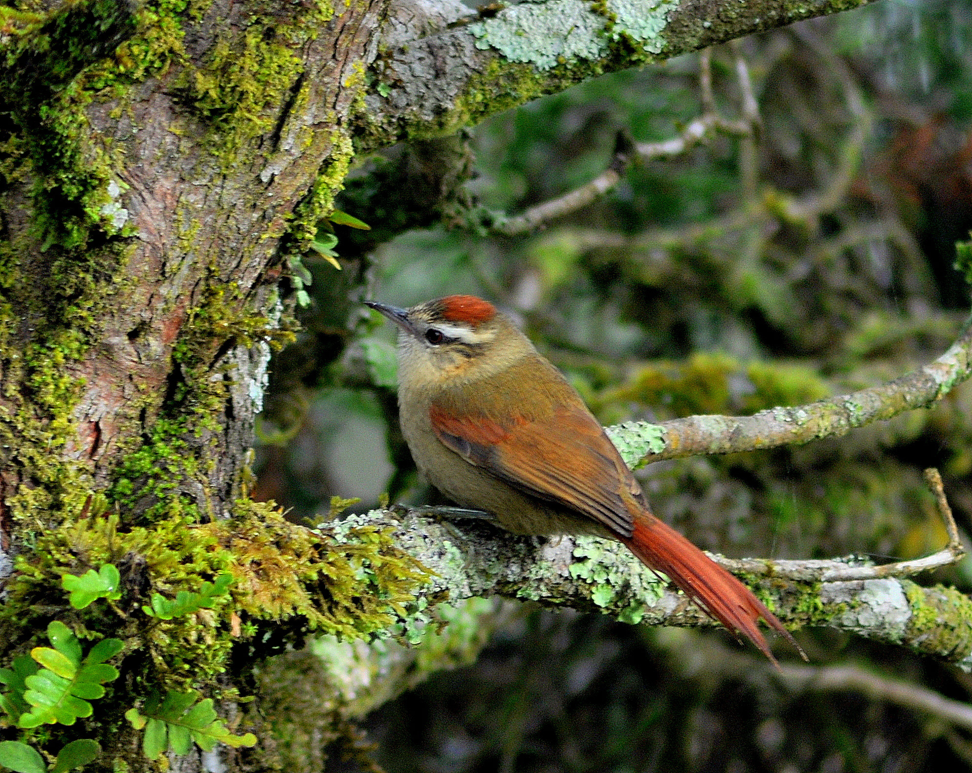 Arredio pálido; Campos do Jordão, São Paulo, Brasil